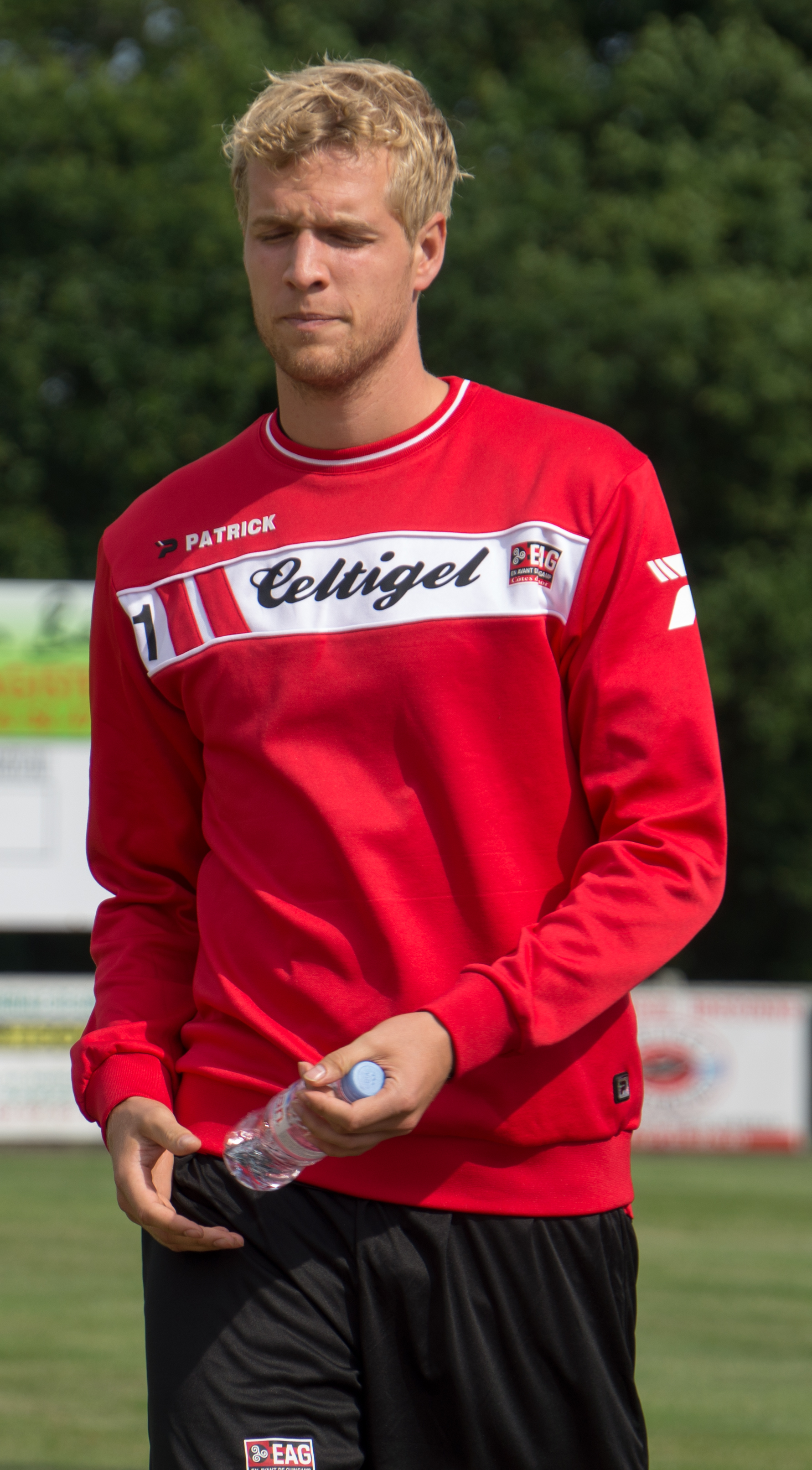 Jonas Lossl à l'entrainement le 11 juillet 2014